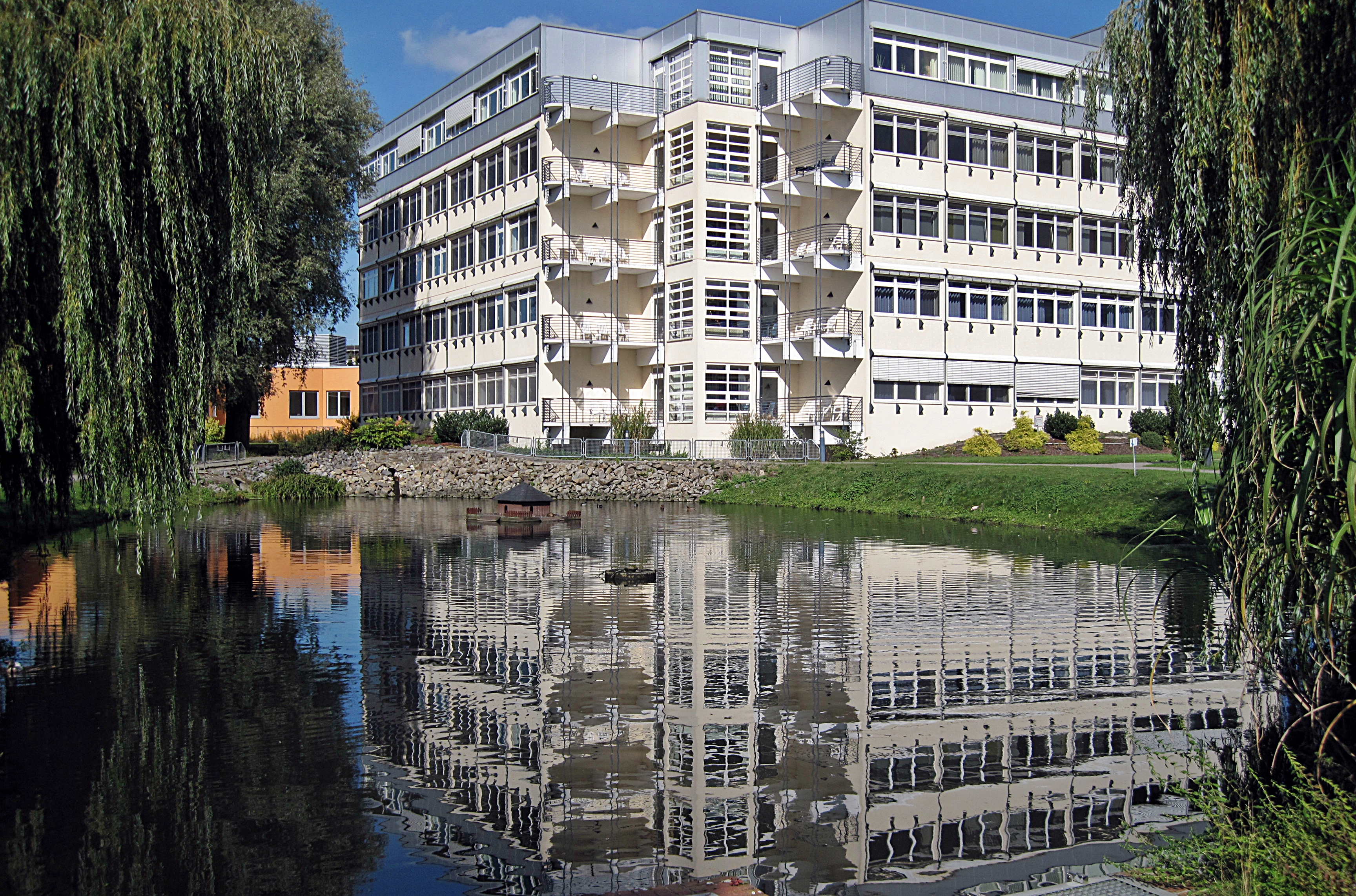 Bad Rothenfelde, Schüchtermannklinik, Ansicht vom Teich